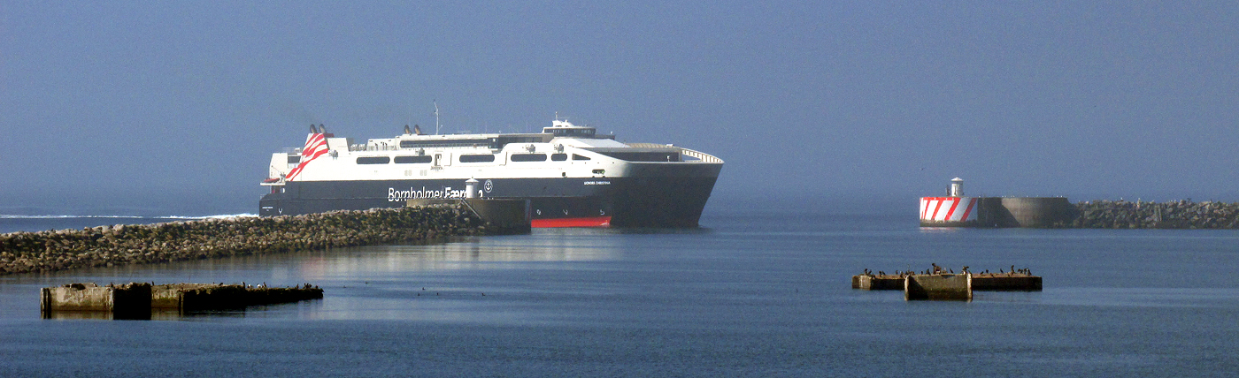 Bornholmsfärjan Leonora Christina på väg in till Ystads hamn 12 april 2014.